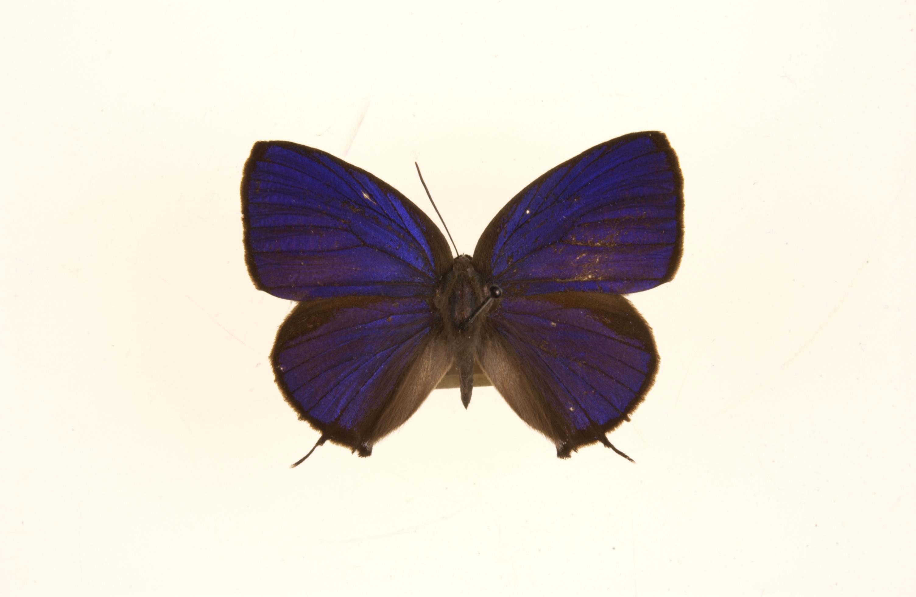 Arhopala silhetensis Male